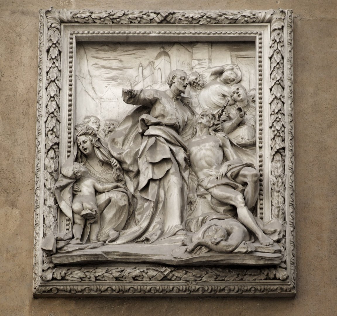 Palermo